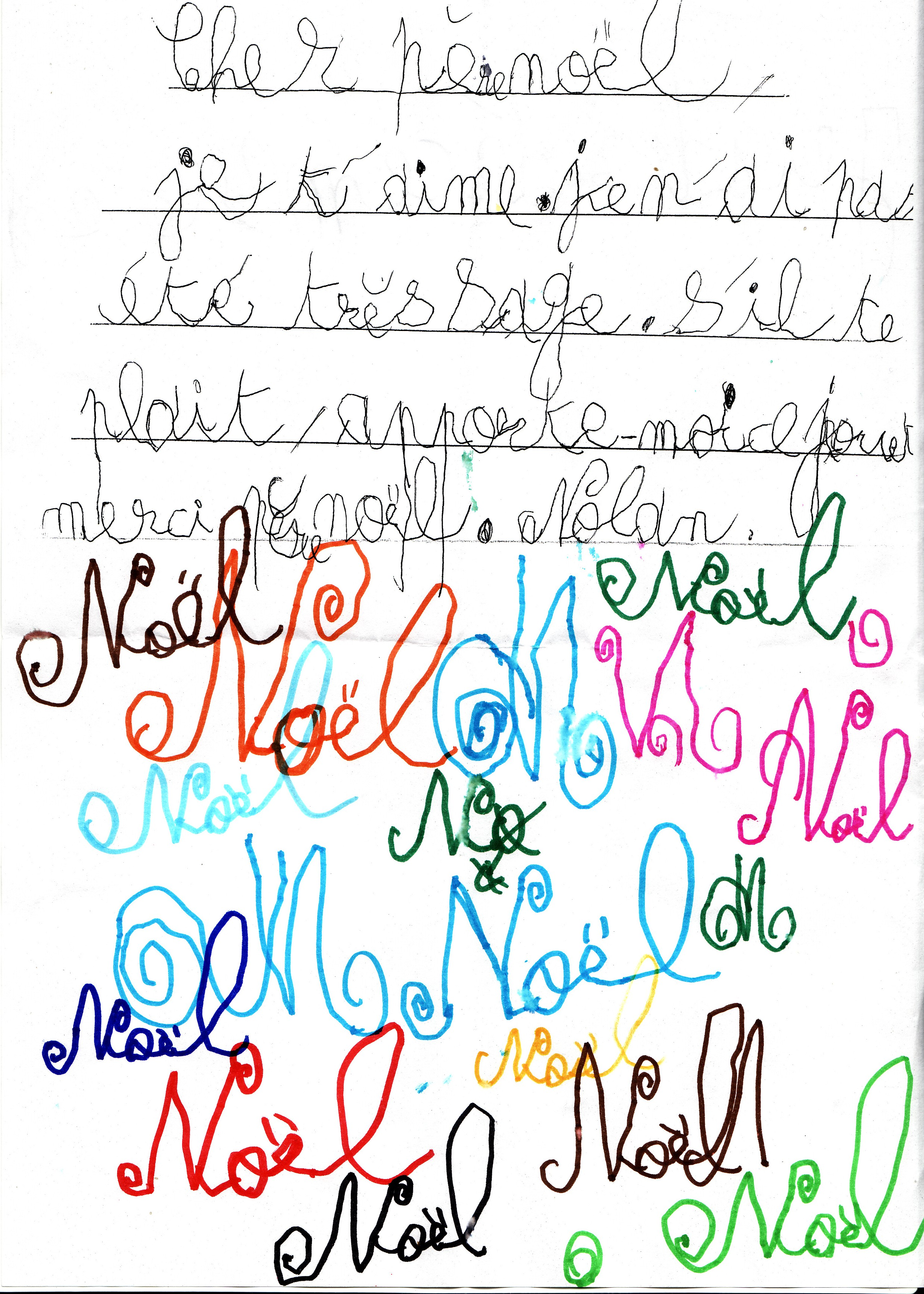 Lettre au Père Noël : Cher Père Noël, je t'aime, je n'ai pas été très sage, s'il te plait, apporte moi ce jouet, merci père Noël.